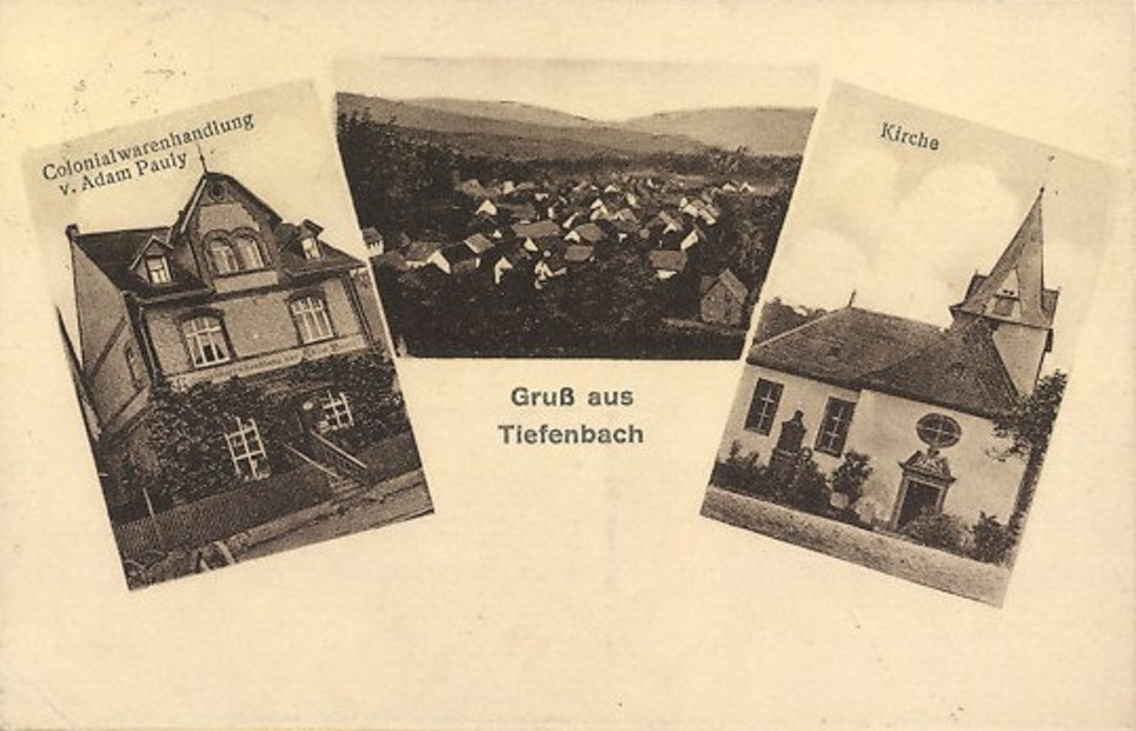 Ansichtskarte der Gemeinde Tiefenbach bei Braunfels: (von links) Colonialwarenhandlung von Adam Pauly (= Im Espchen 3), Eigentum der Familie Pauly bis 2019, Ortsansicht aus der Vogelschau, Kirche